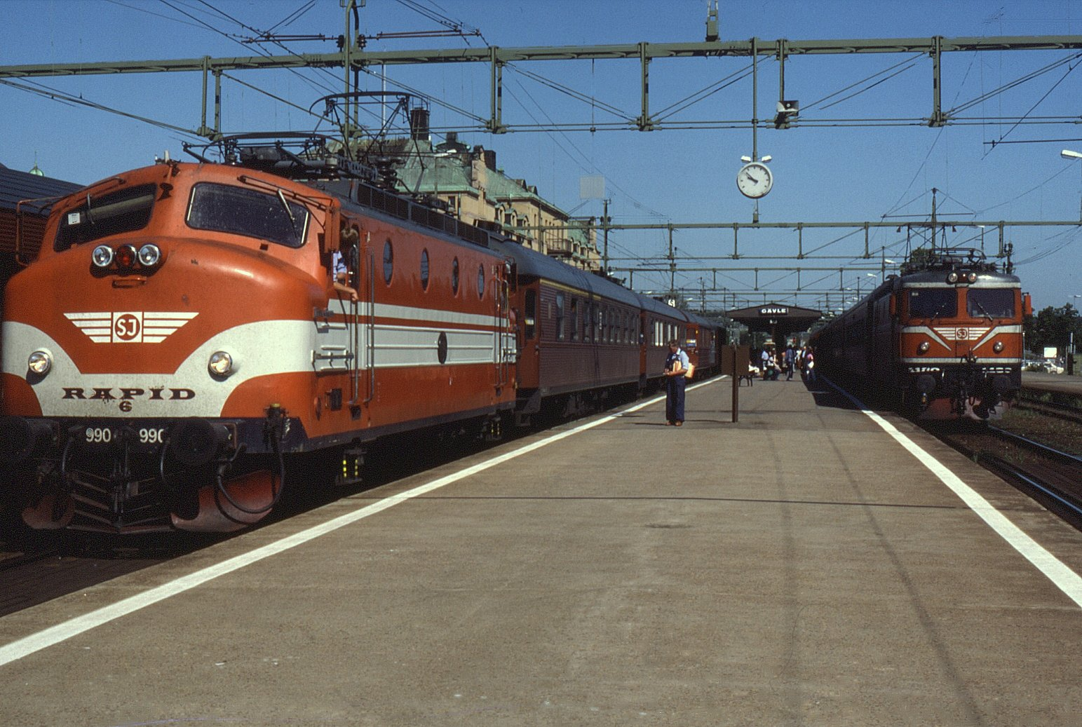 18.06.86 Gälve Ra 990 & Rc4 1180